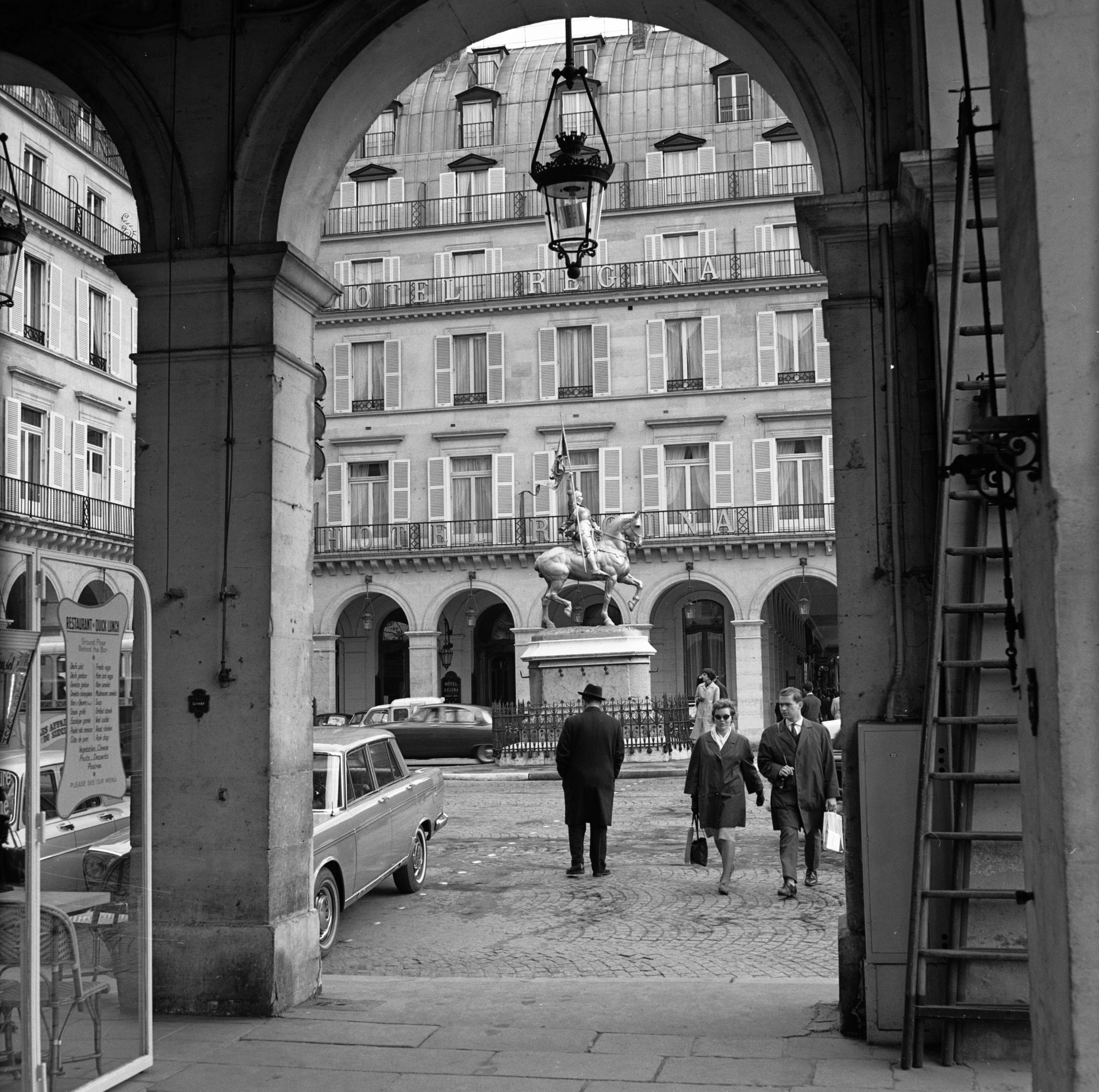 Collectie / Archief : Fotocollectie Van de Poll Reportage / Serie : Pariser Bilder [Het straatleven van Parijs] Beschrijving : Place des Pyramides gezien vanuit de Rue de Rivoli, met op de achtergrond Hôtel Regina en het standbeeld van Jeanne d'Arc Datum : 1965 Locatie : Frankrijk, Parijs Trefwoorden : gebouwen, standbeelden, straatbeelden Fotograaf : Poll, Willem van de Auteursrechthebbende : Nationaal Archief Materiaalsoort : Negatief (6x6) Nummer archiefinventaris : bekijk toegang 2.24.14.02 Bestanddeelnummer : 254-0310